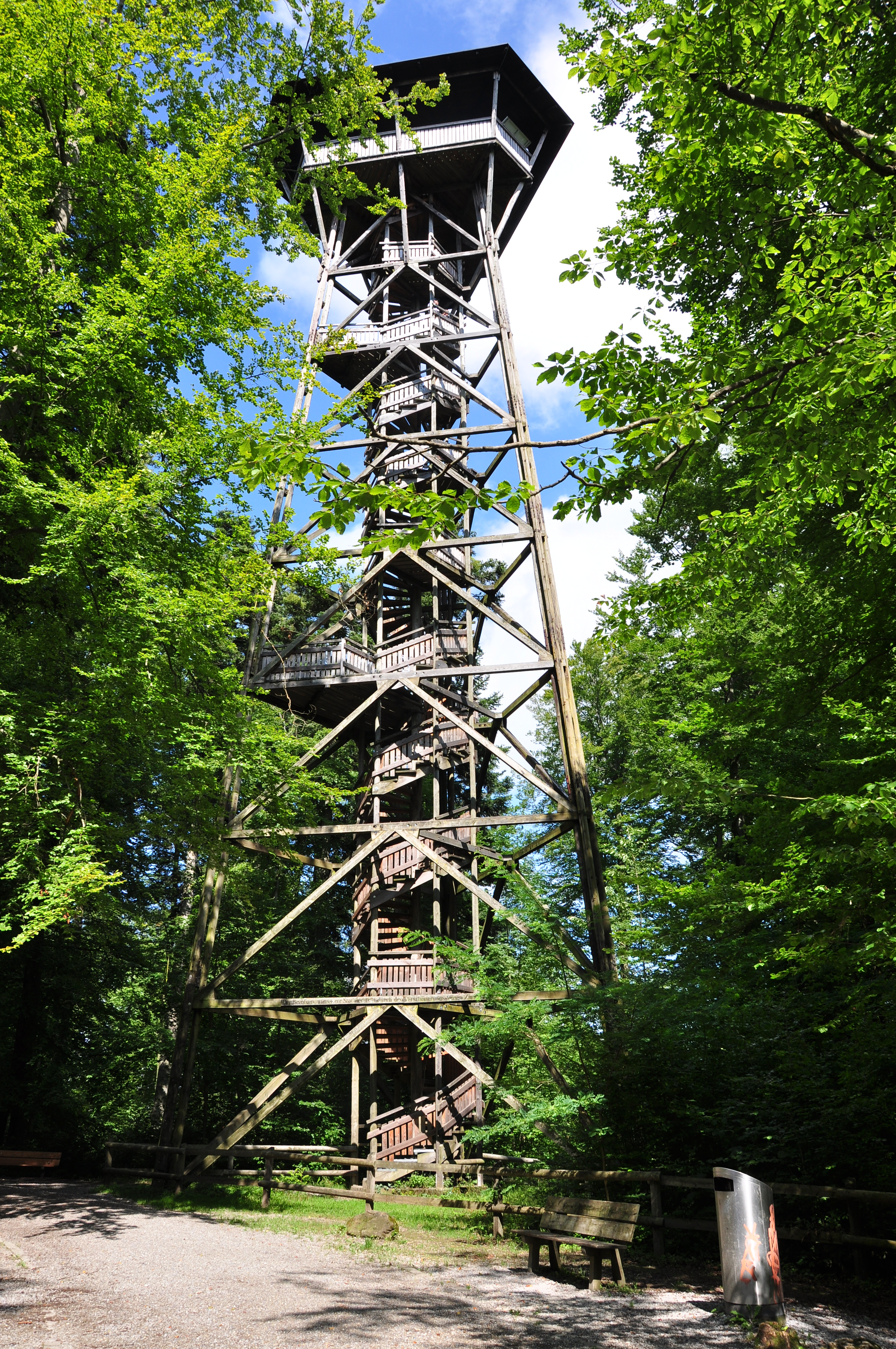 Loorenkopf tower on Adlisberg in Zürich-Witikon (Switzerland)